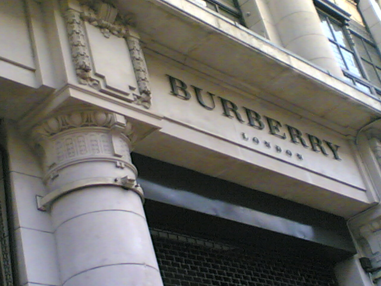 Enseigne du magasin principal de Burberry sur Haymarket à Londres.